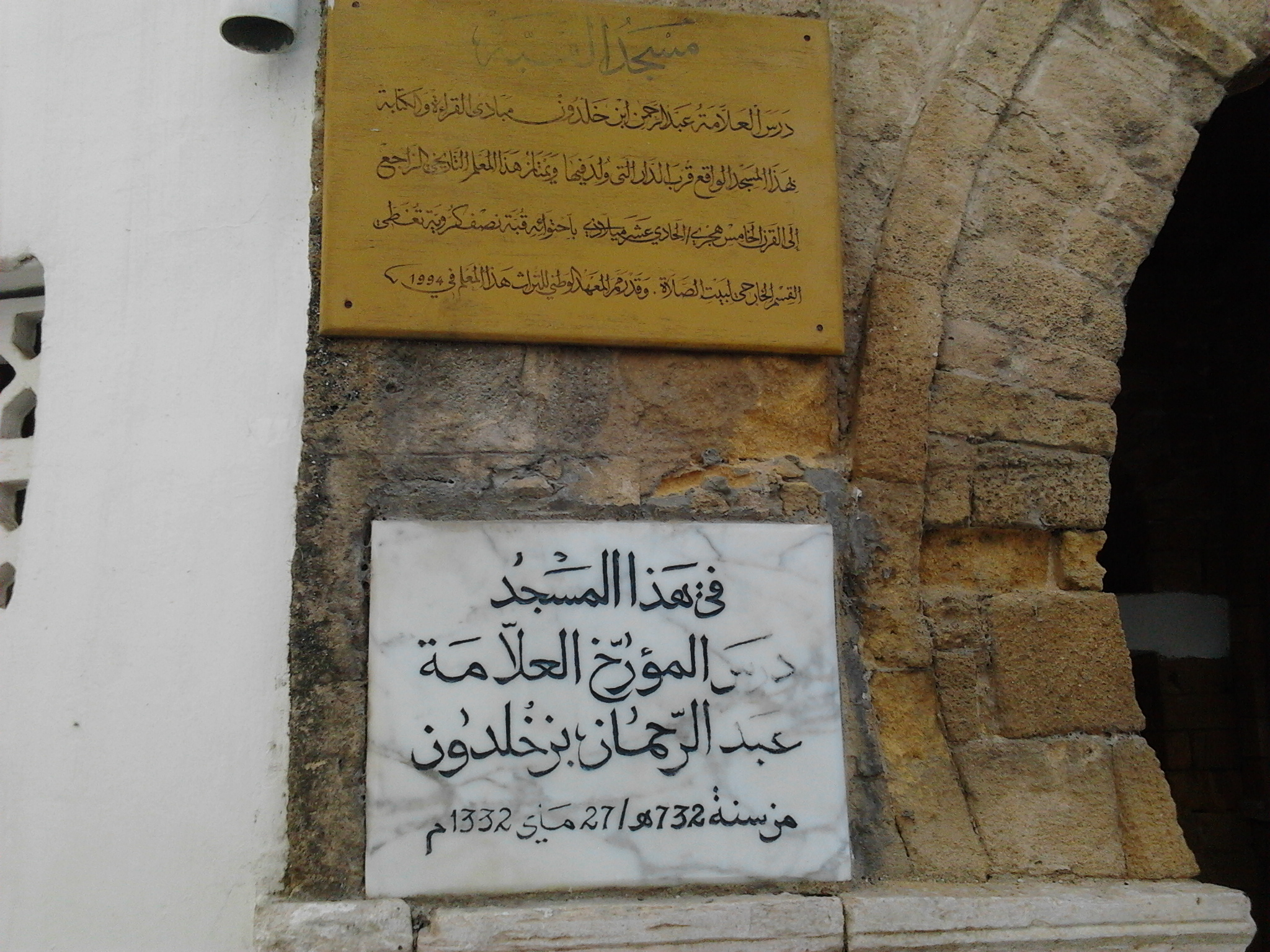 La mosquée dans laquelle Ibn Khaldoun a fait ses études à partir du 732 Hégir / 27 Mai 1332